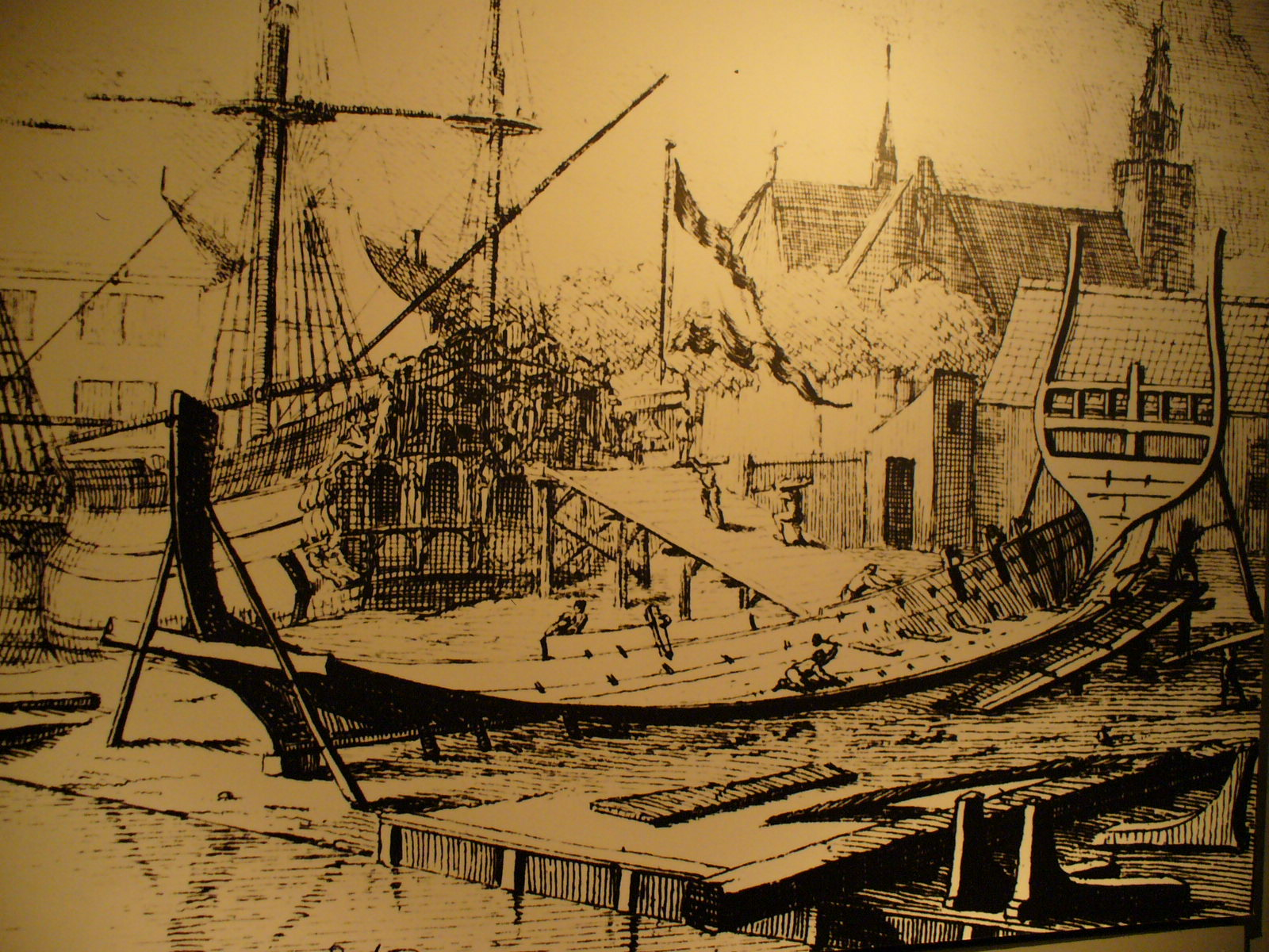 Metszett a Vasa hajo epiteserol. Sajat digitalis kamera. --Math 2005. október 19., 14:55 (CEST) hivatkozando forras: Brendel Matyas